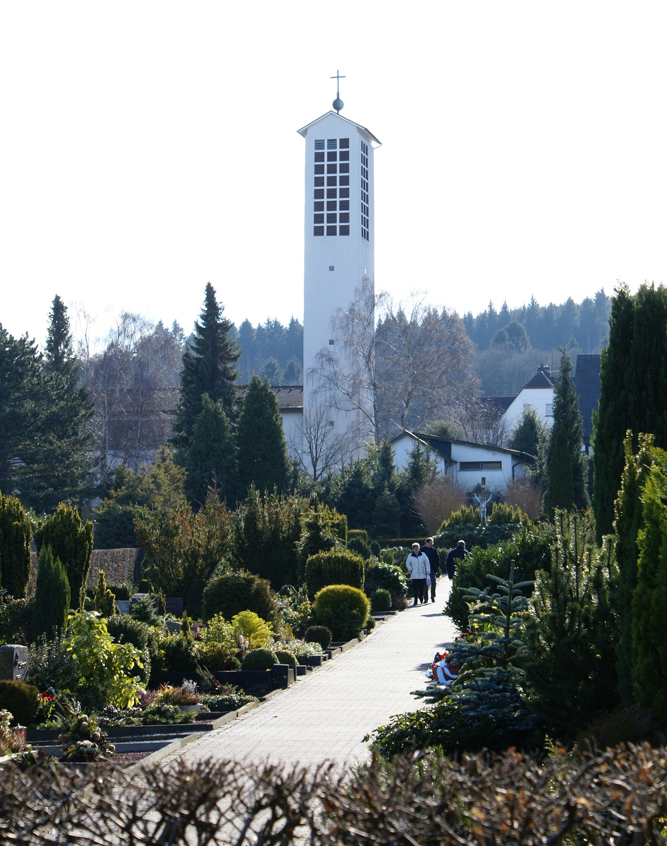 Turm der Christuskirche in Hemer-Sundwig, hinter dem Friedhof